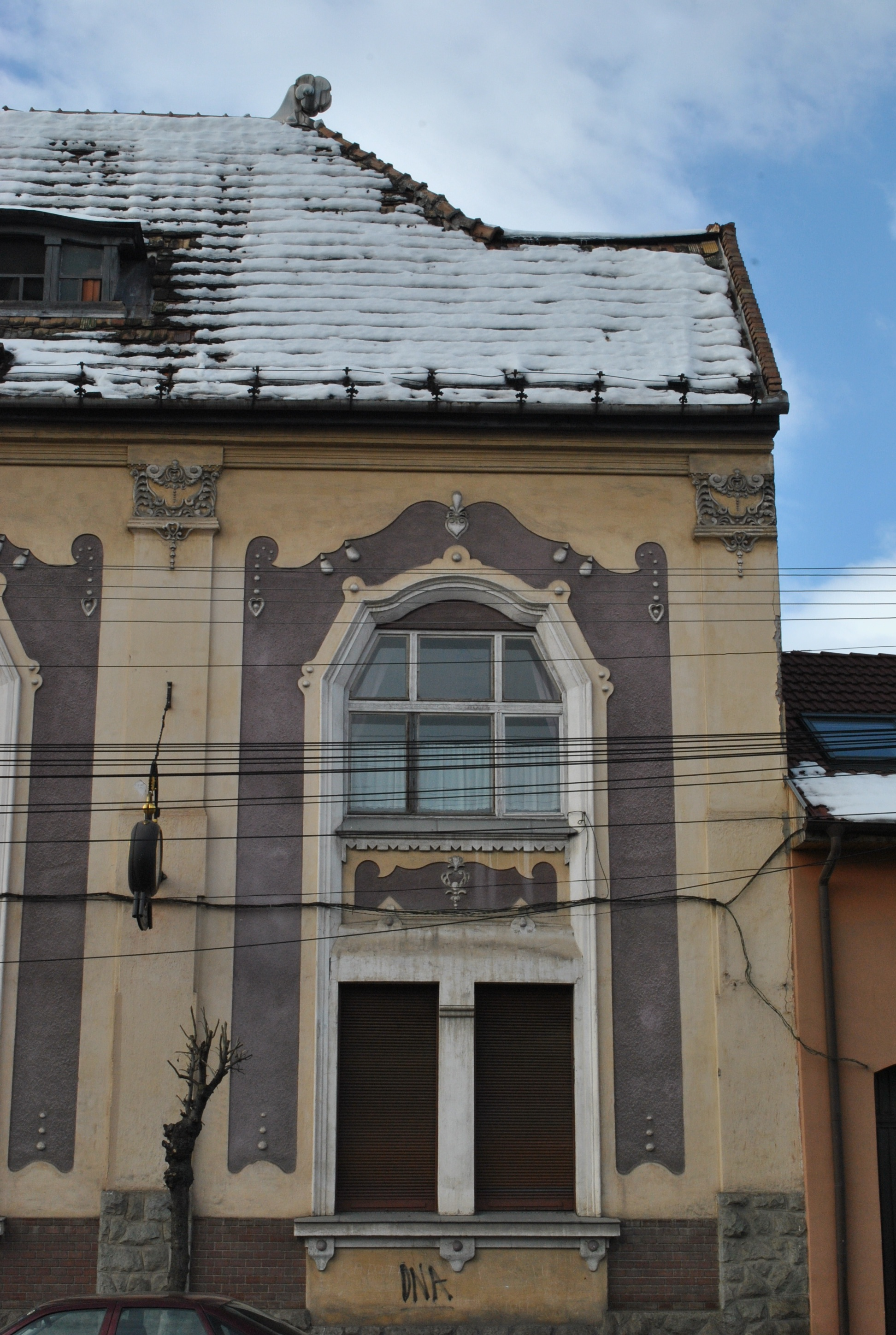 Casă, sf. sec. XIX-înc. sec. XX